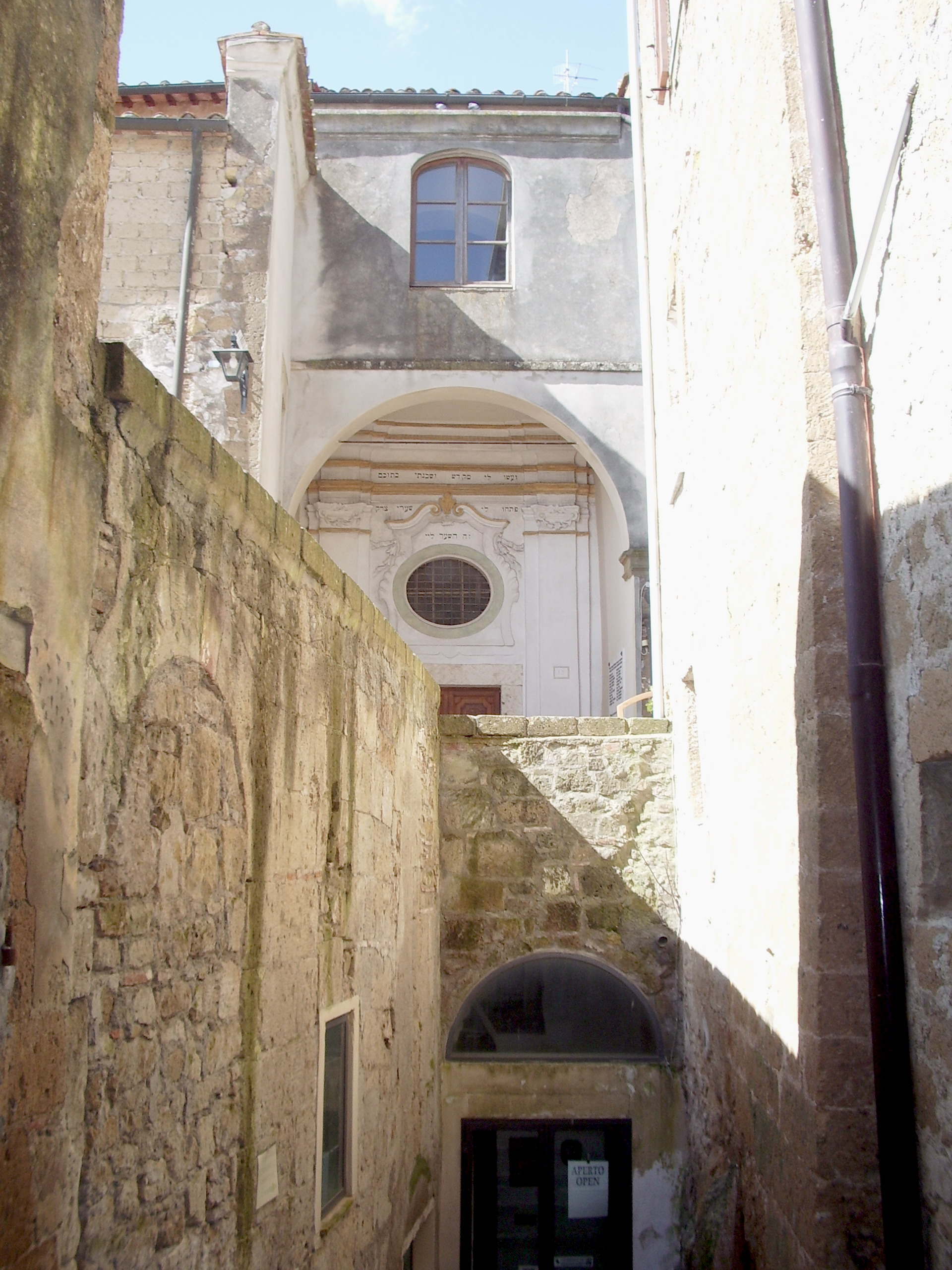 Esterno della Sinagoga di Pitigliano